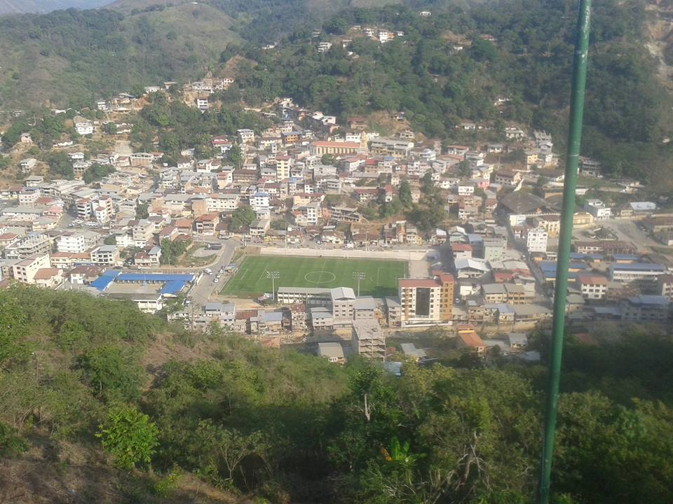 Estadio de Portovelo 2016